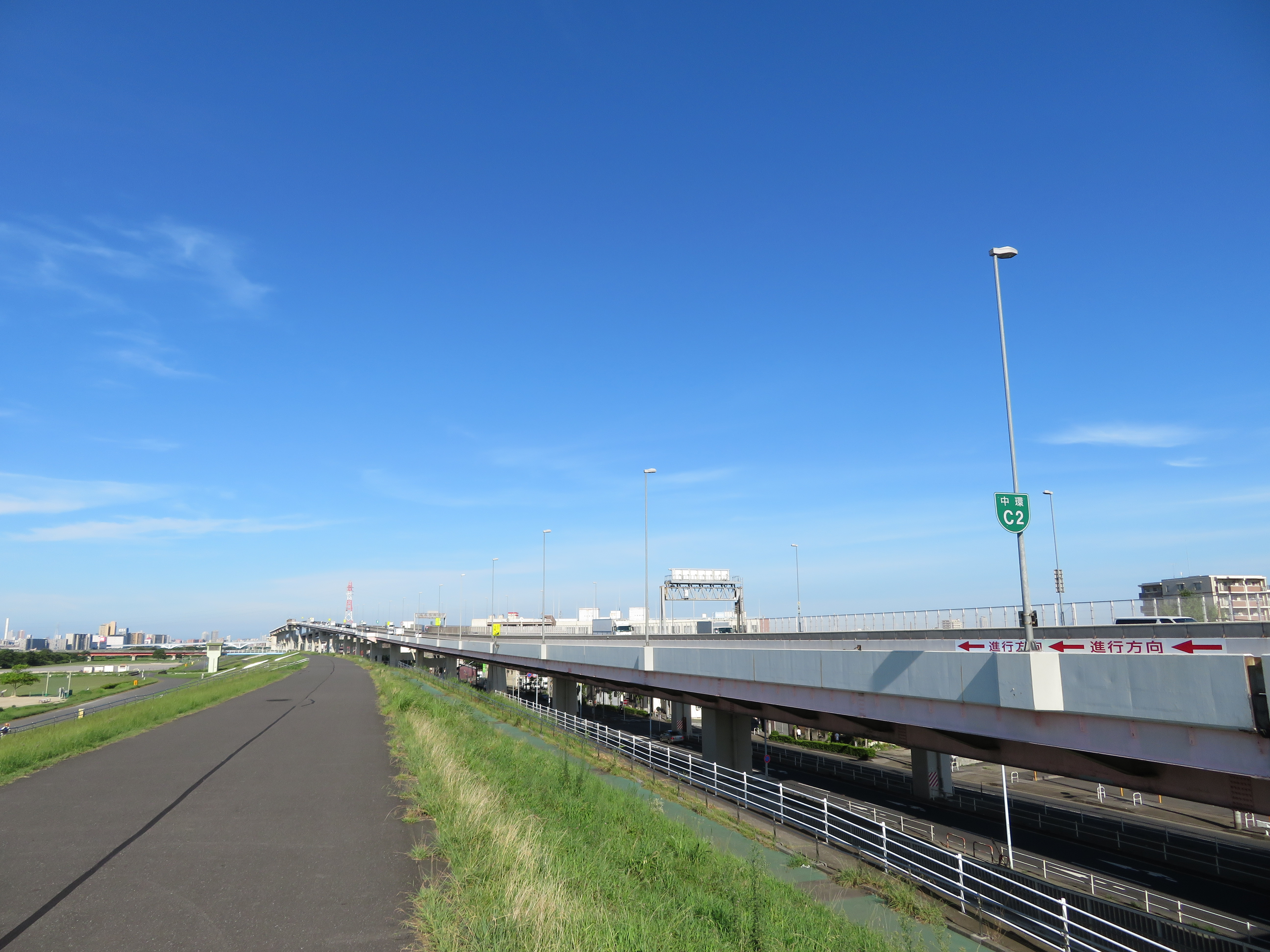 首都高速道路中央環状線（千住新橋−扇大橋間、荒川土手から撮影） Canon PowerShot SX720 HS